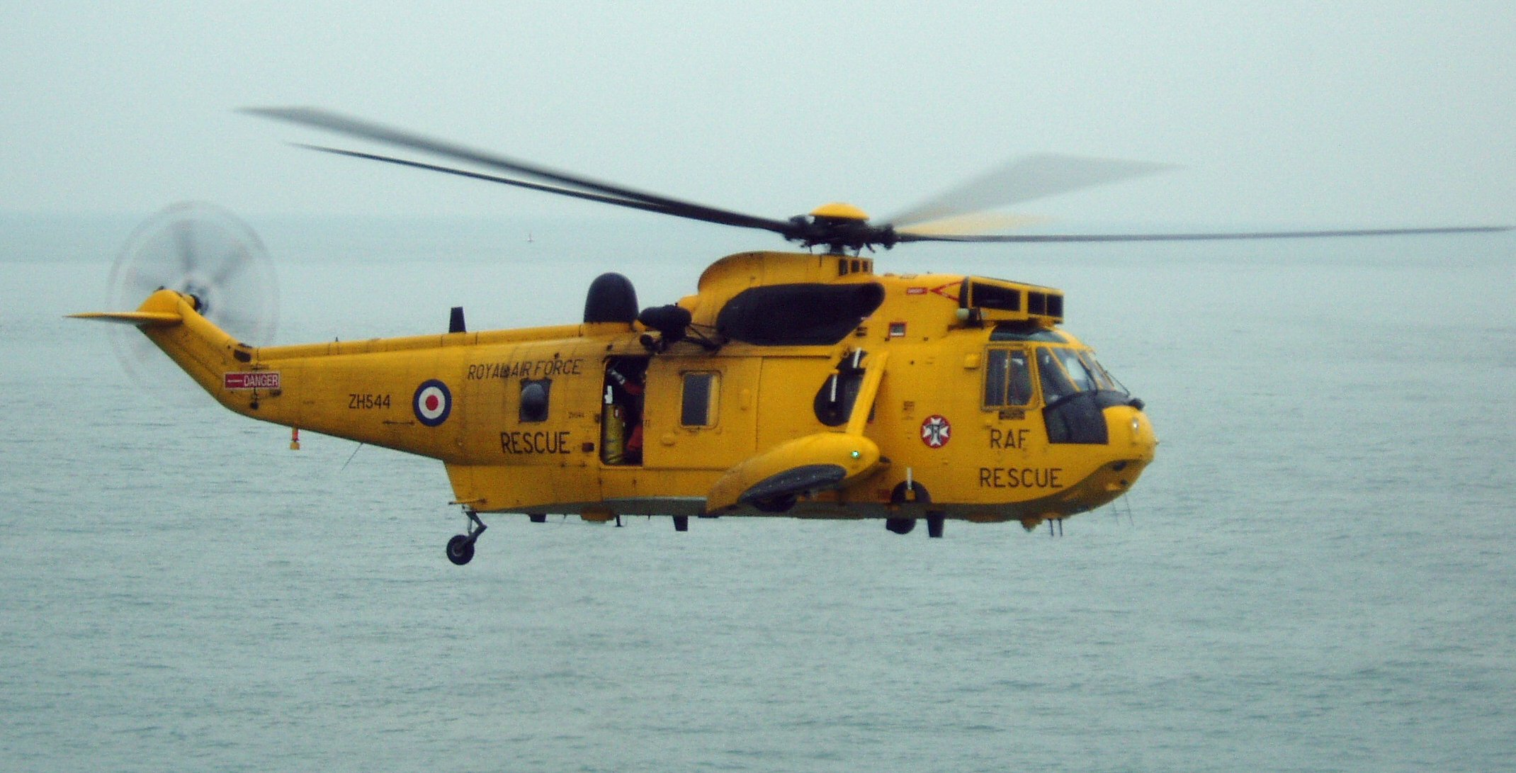 RAF Rescue Helicopter